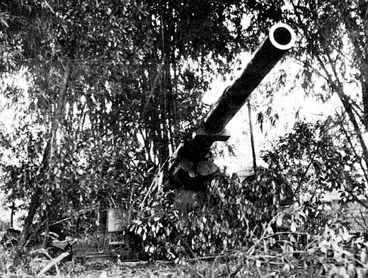 155 mm Kanone bei Dagupan, Philippinen, 1941)